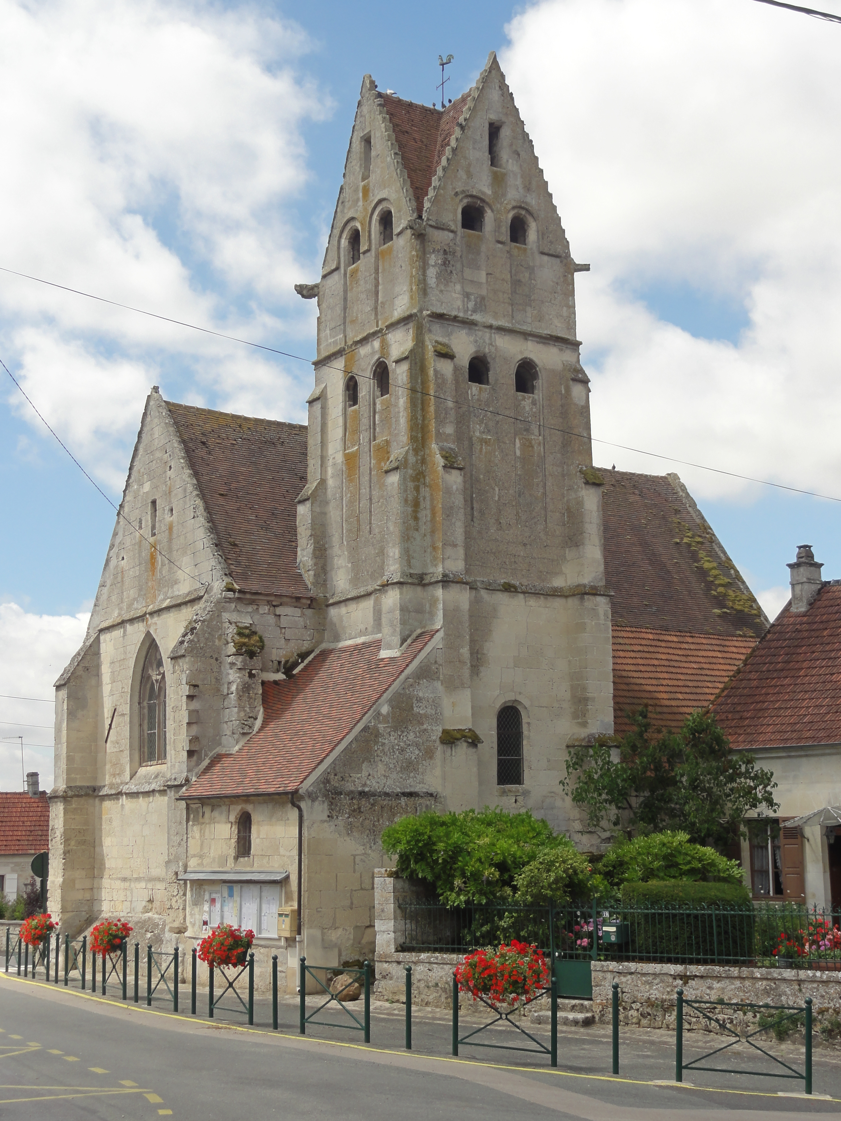 Église Saint-Léger d'Éméville (voir titre).